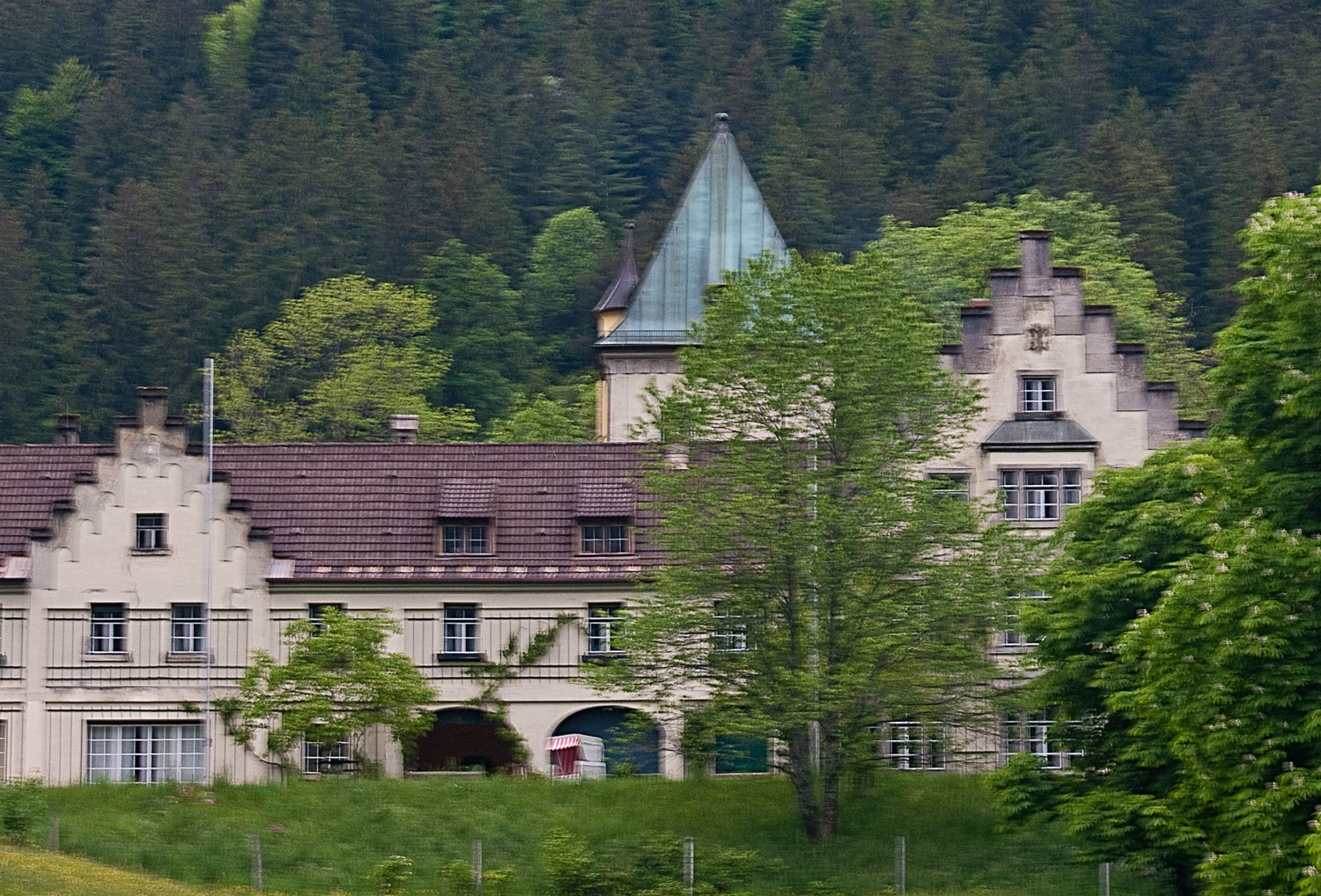 . Baudenkmal in Eschenlohe, Schloss Wengwies, stattlicher putzgegliederter Gruppenbau in historisierenden Formen mit Erkern, Staffelgiebeln und Turm, von Albert Jack und Max Wanner, bez. 1902.